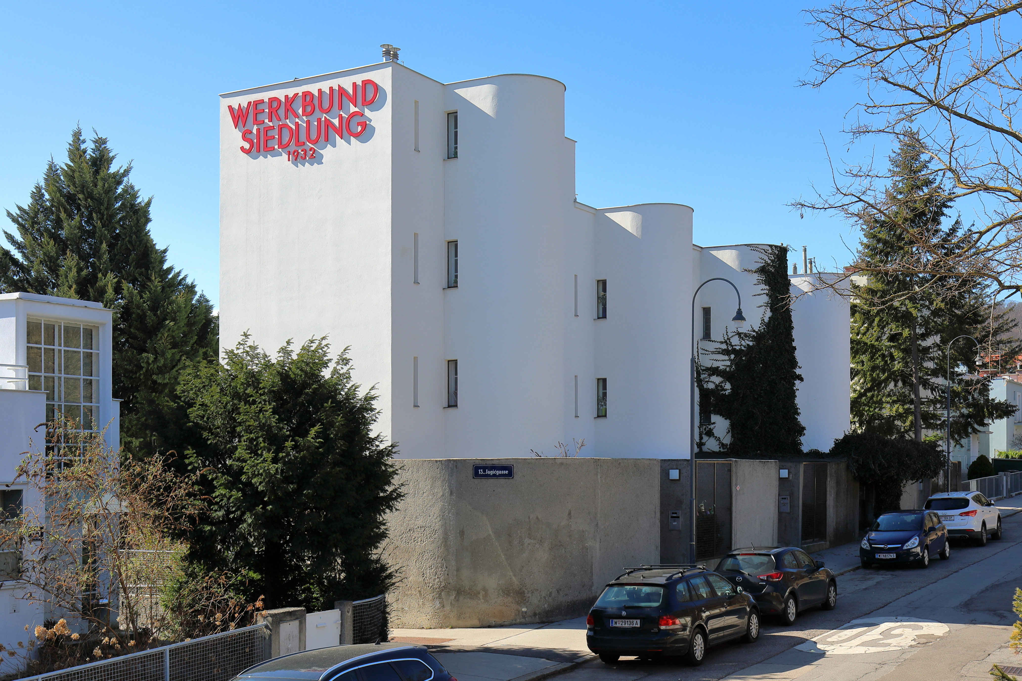 Die 4 Reihenhäuser Veitingergasse 87-93 der Werkbundsiedlung Wien im 13. Wiener Gemeindebezirk Hietzing.Errichtet wurden die 4 Reihenhäuser um 1930 nach Plänen des französischen Architekten André Lurçat. Sie sind ein Teil einer Mustersiedlung von etwa 70 Häusern mit rund 50 verschiedenen Haustypen, die von 1929 bis 1932 gebaut wurden. An der Planung der einzelnen Häuser beteiligten sich über 30 Architekten. This media shows the Vienna residential building (Gemeindebau) with the ID 61.